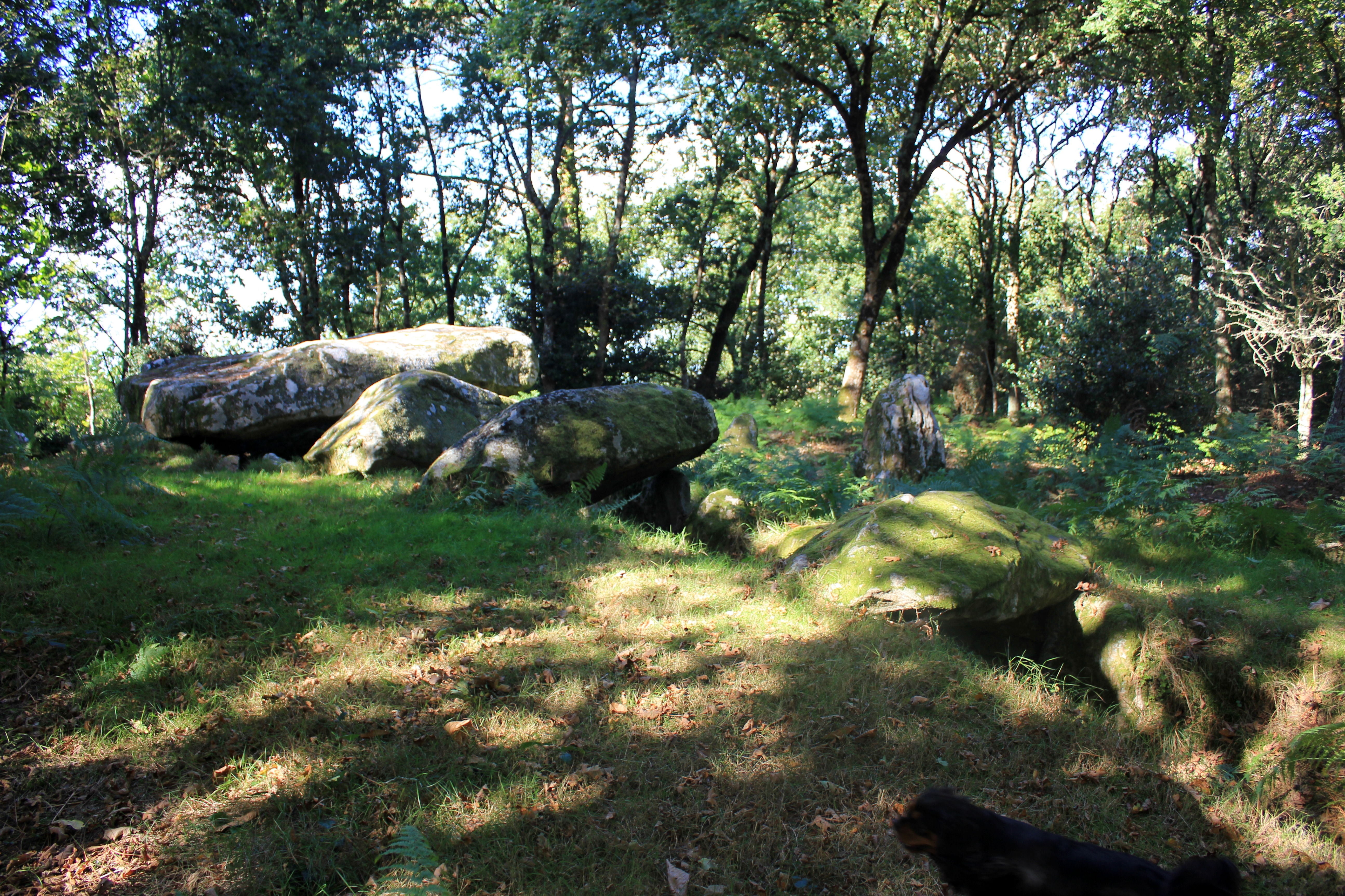 Dolmen de Mané-er-Loh : vue générale